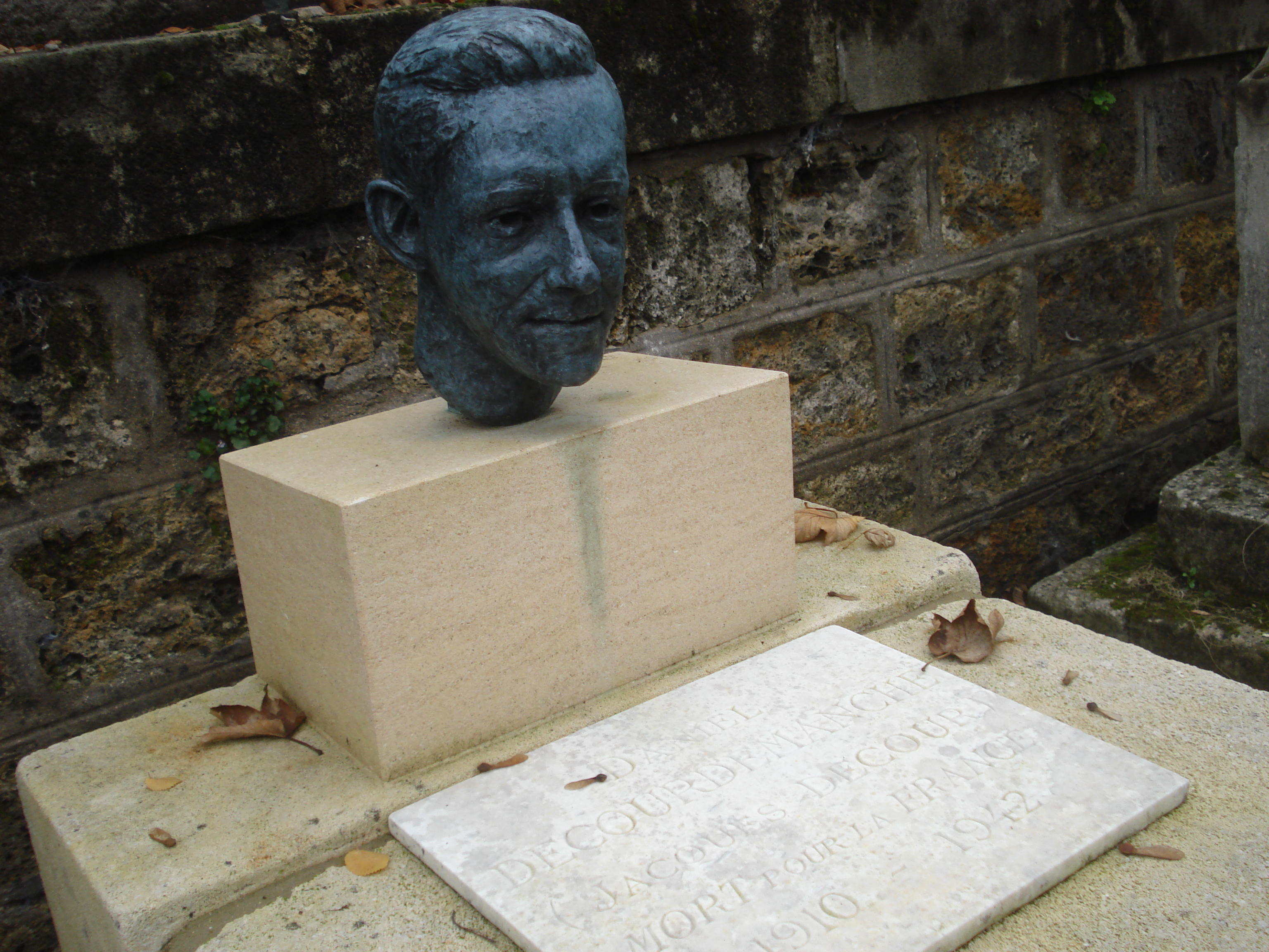 Jacques Decour, nom de résistant de Daniel Decourdemanche, est un écrivain et résistant français, né le 21 février 1910 à Paris, mort pour la France fusillé par les nazis le 30 mai 1942 (à 32 ans) au fort du Mont-Valérien. La tombe a été restaurée. (Association Sauvons le patrimoine - Association pour la préservation et la valorisation des richesses patrimoniales du collège-lycée Jacques Decours). Le 7 avril 2015 a eu lieu au lycée Jacques Decour et au cimetière Montmartre des manifestations en l'honneur de Jacques Decour. Inauguration du buste, œuvre de Peter Thomas.